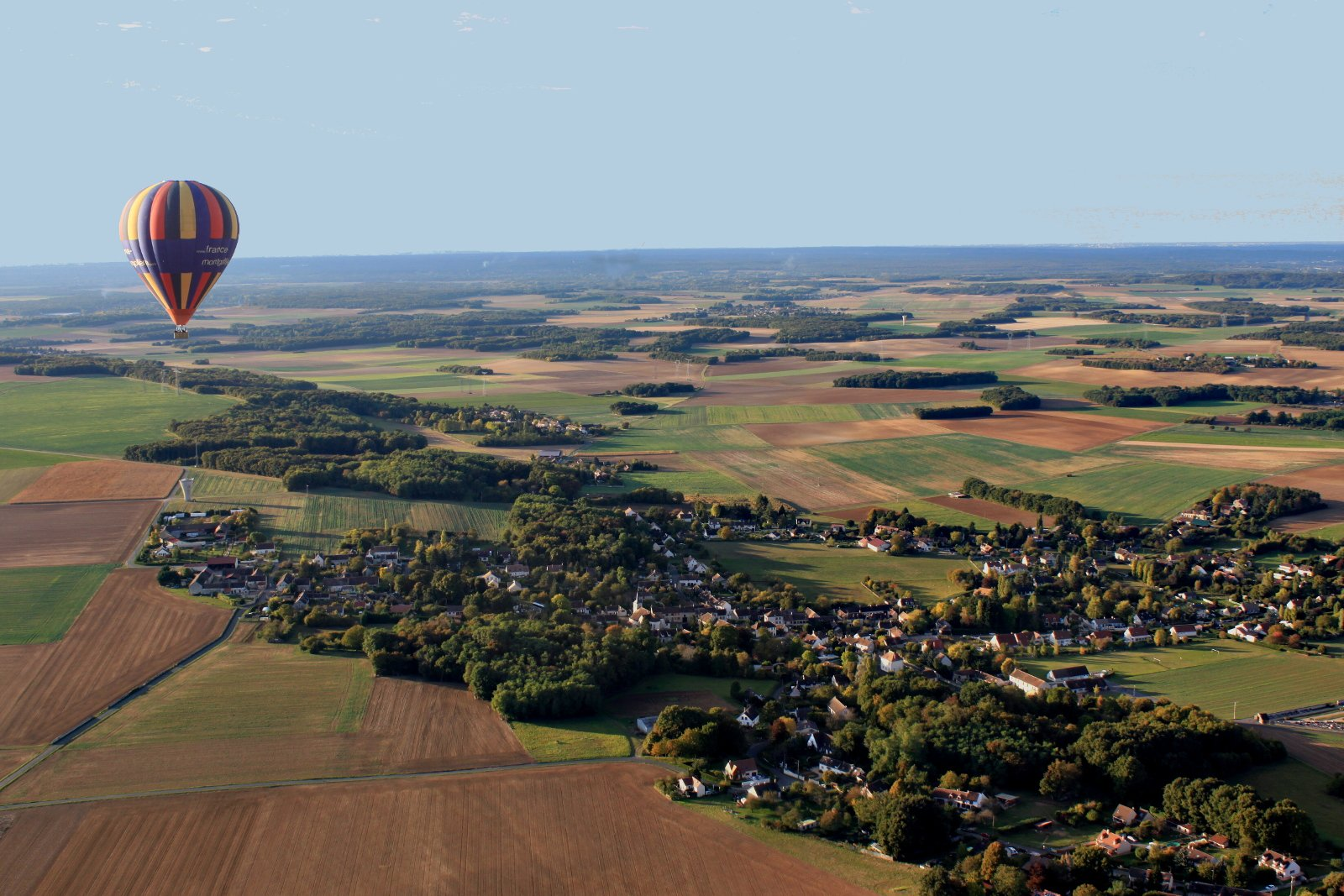 Villemaréchal et le Bocage Gâtinais